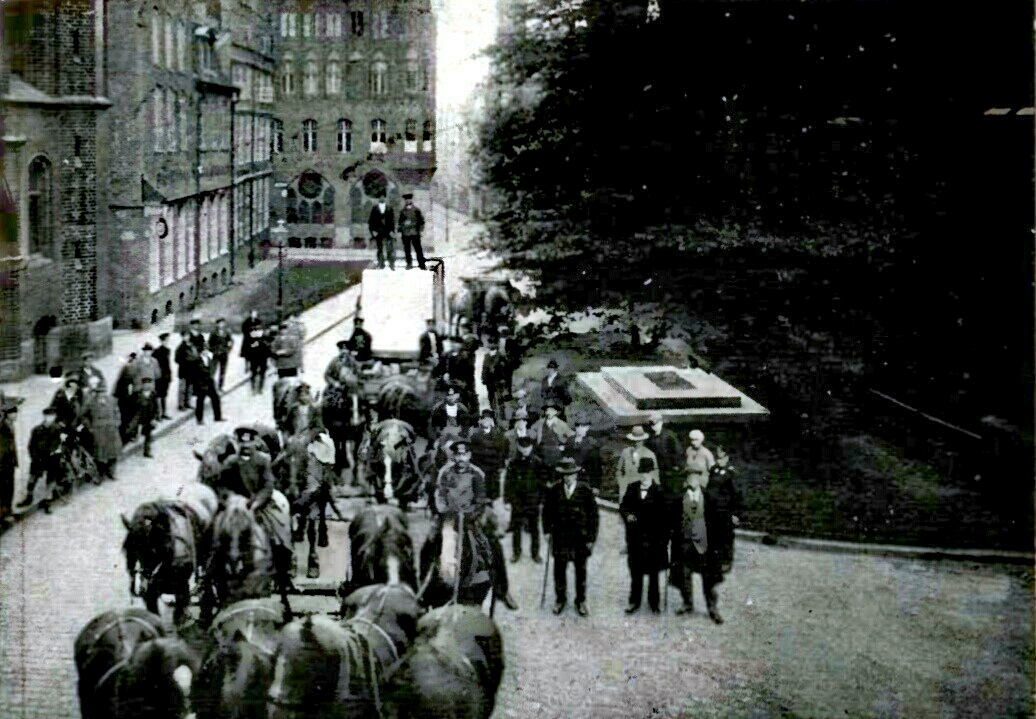 Transport des 23 000 kg schweren Hauptblocks zu dem Kriegerdenkmal bei St. Marien am 8. Oktober, morgens um 6 ½ Uhr.